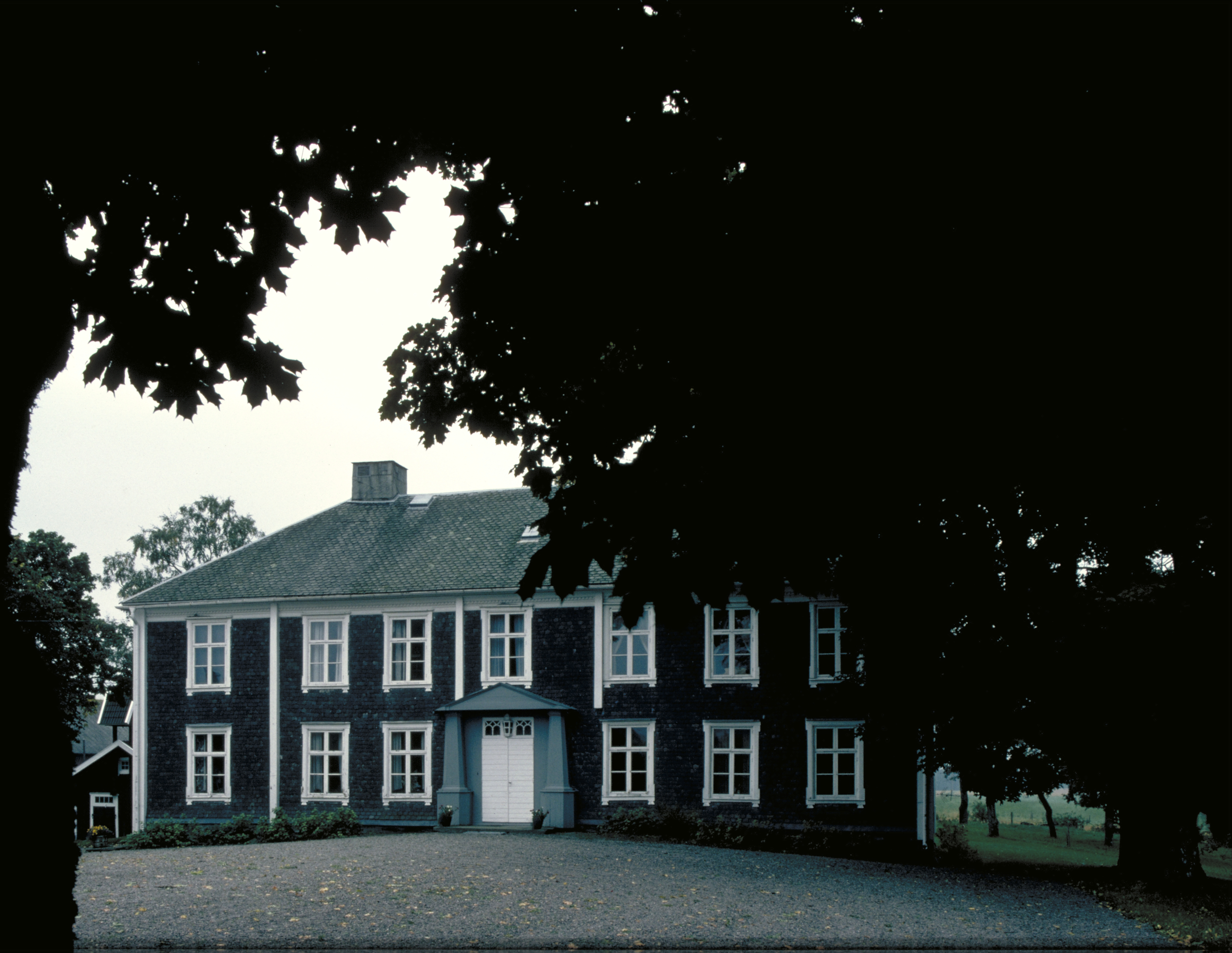 Fasad och tak är täckta av skiffer. Bilden troligen från omkring 1980. Motiv: Ekholmen Nyckelord: Byggnadsminnen, Riksintressen Kategori: Herrgård Fasad och tak är täckta av skiffer. Bilden troligen från omkring 1980.